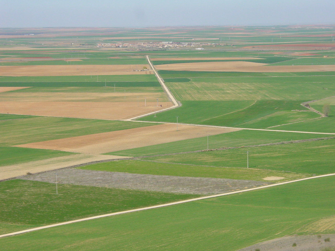 Paisaje castellano visto desde las murallas de Urueña (Valladolid, España)